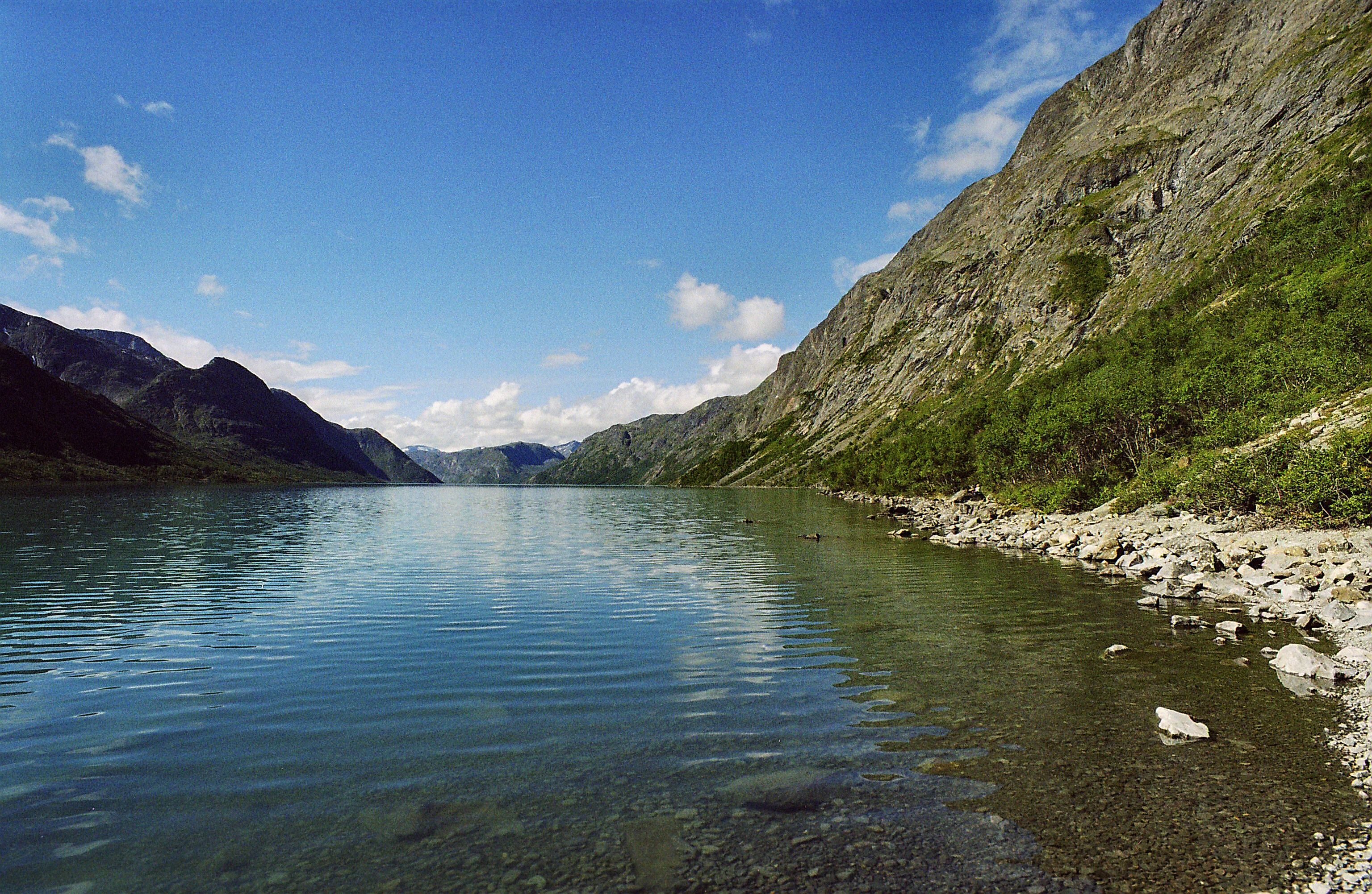 Gjende Lake in Jotunheimen National Park, Norway. August 2004.